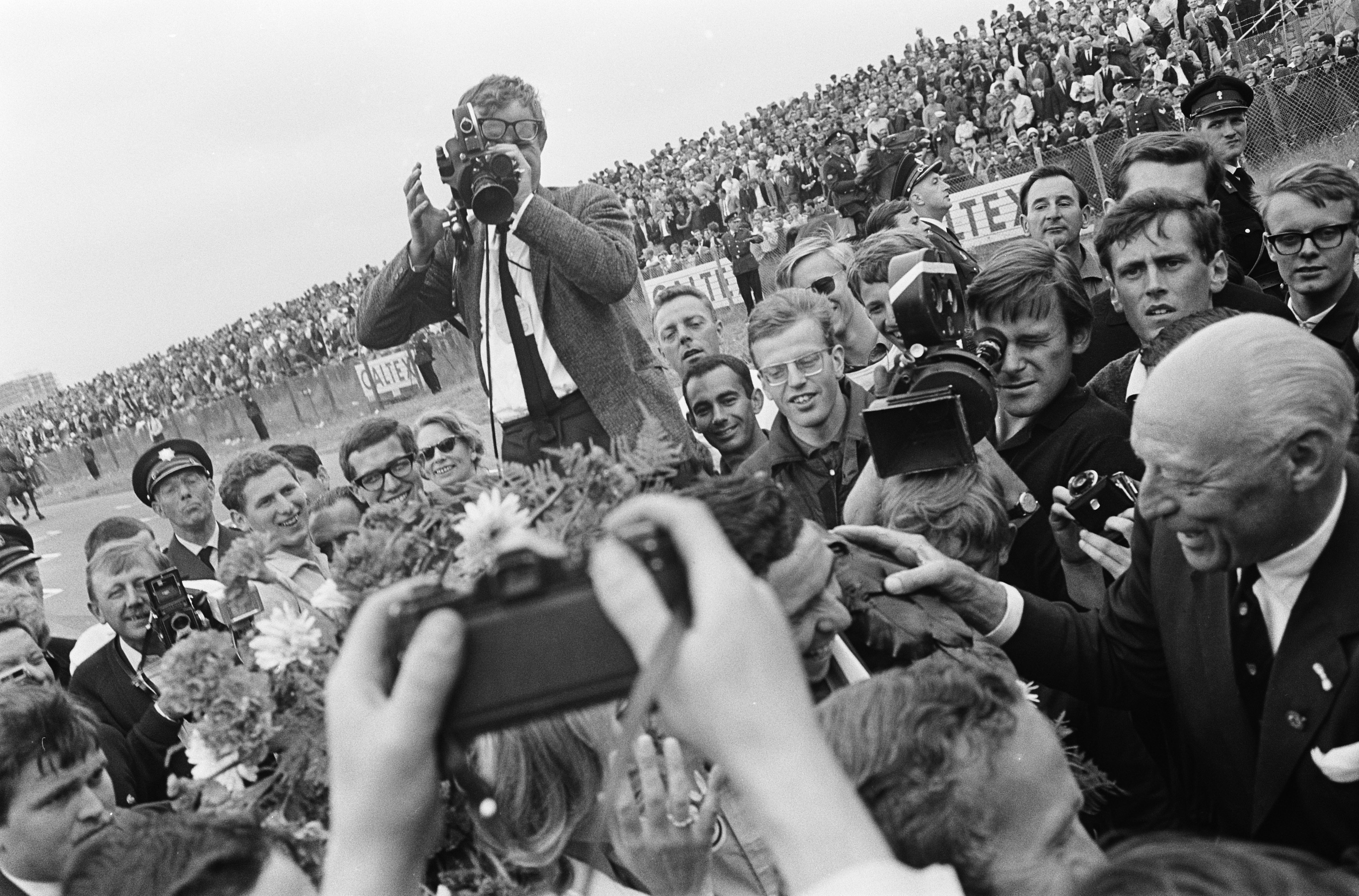 Collectie / Archief : Fotocollectie Anefo Reportage / Serie : [ onbekend ] Beschrijving : Grote Prijs van Zandvoort, Jim Clark na de race, omstuwd door pers en publiek Annotatie : [Rechts waarschijnlijk prin Paul Alfons von Metternich-Winneburg, lid van het FIA-comité] Datum : 18 juli 1965 Locatie : Noord-Holland, Zandvoort Trefwoorden : races Persoonsnaam : Jim Clark Fotograaf : Koch, Eric / Anefo Auteursrechthebbende : Nationaal Archief Materiaalsoort : Negatief (zwart/wit) Nummer archiefinventaris : bekijk toegang 2.24.01.05 Bestanddeelnummer : 917-9755